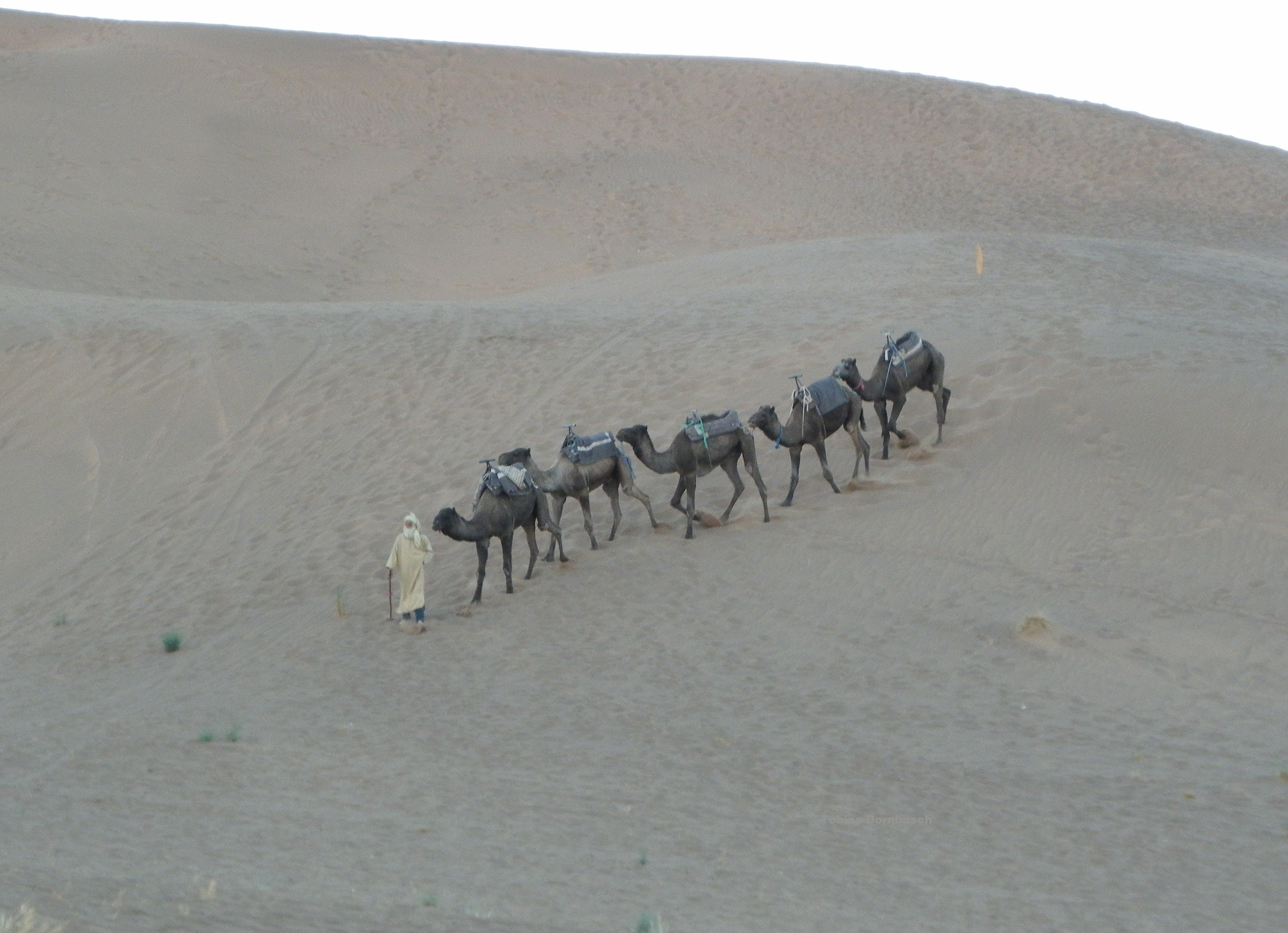 Karawane aus fünf Dromedaren